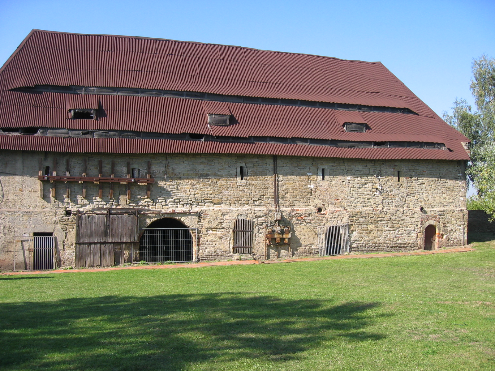 Sogenanntes "Abtshaus" -Romanischer Profanbau aus der zweiten Hälfte des 12. Jh -wahrscheinlich Infermerie des Kloster Posa